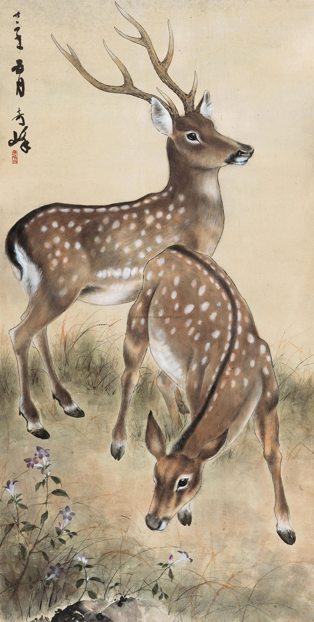 高奇峰所繪的鹿